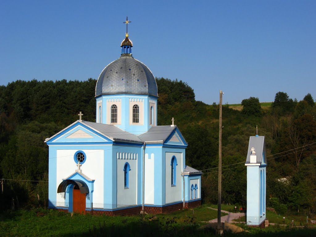 Церква святого Івана Богослова у с. Березів, Старосамбірський район, Львівська область.